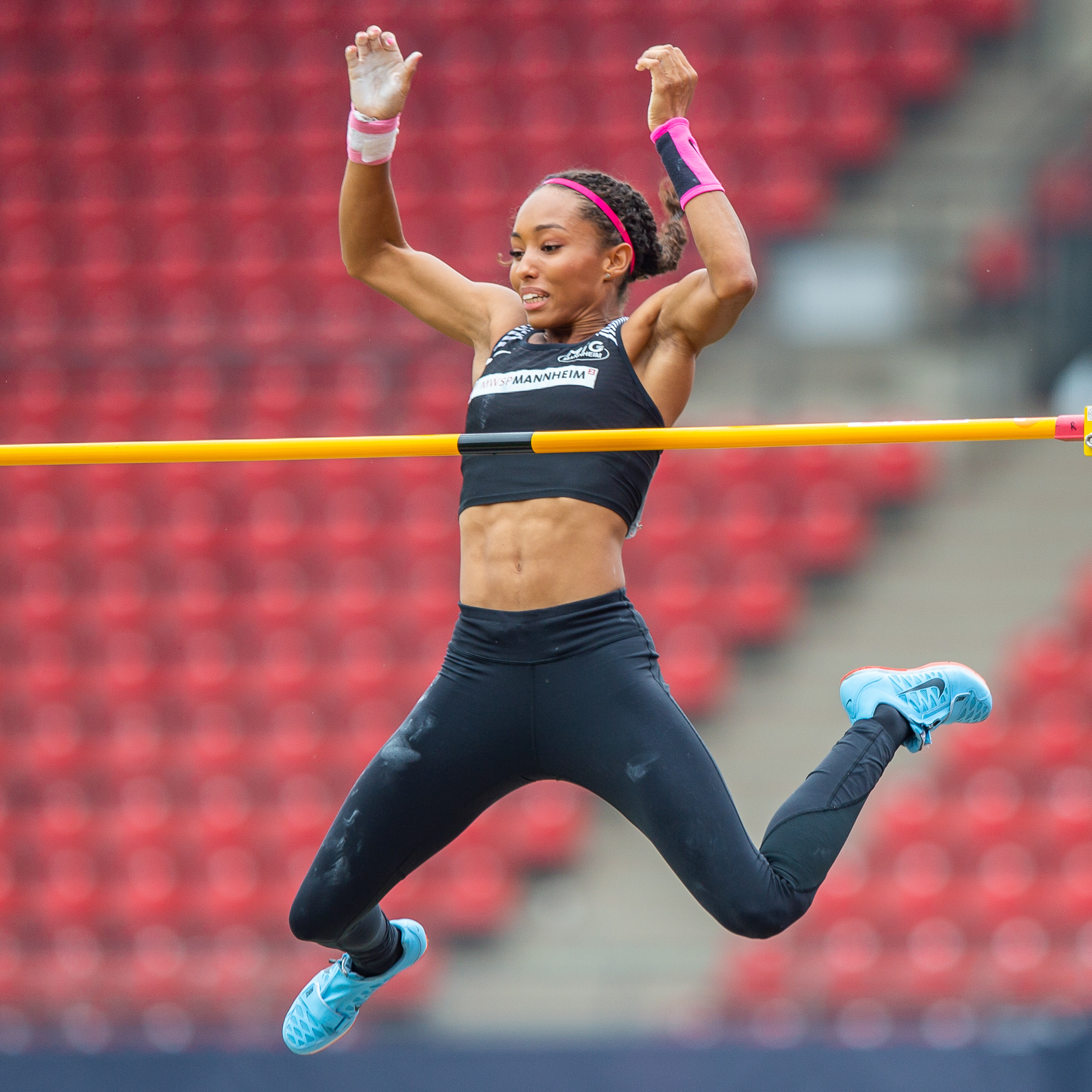 DLV,Deutsche Leichtathletik Meisterschaften 2018,Deutscher Leichtathletik-Verband,Jacqueline Otchere,MTG Mannheim,Max-Morlock-Stadion,Pole vault,Stabhochsprung